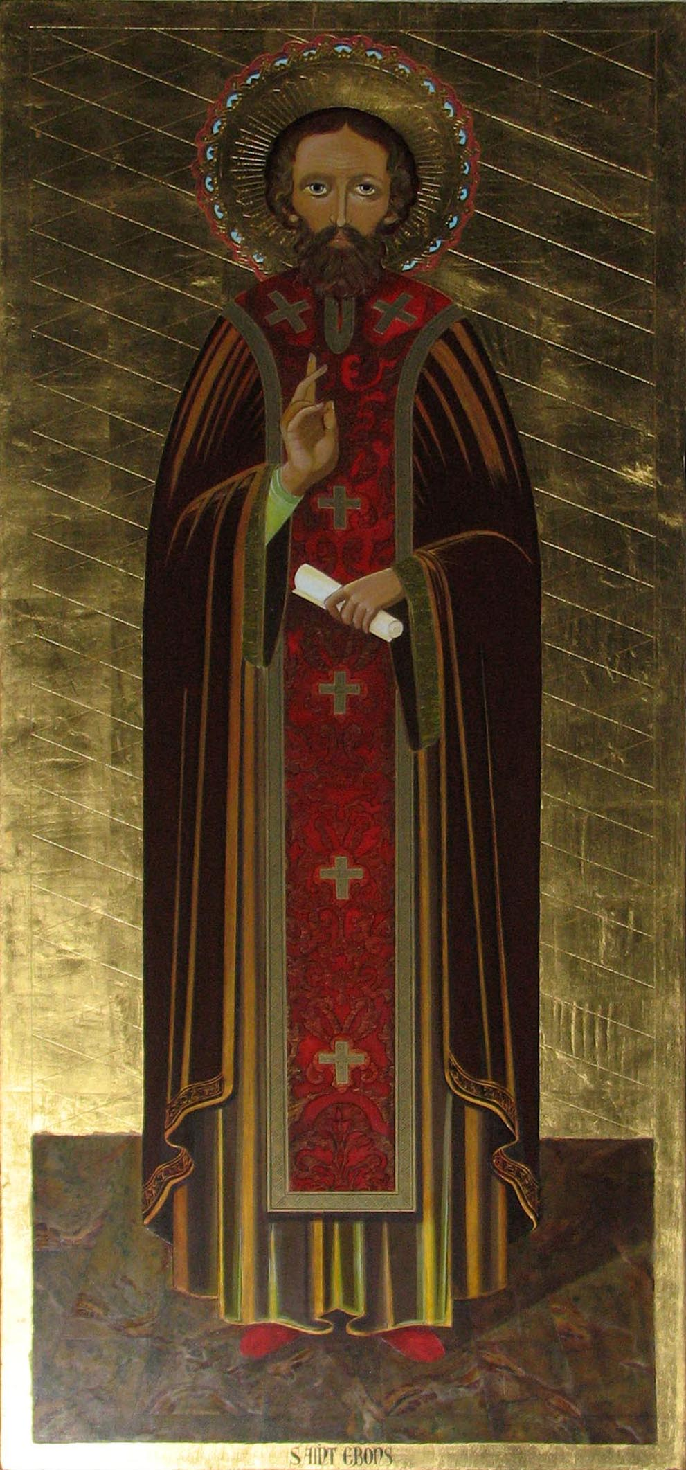 Sant Ebons